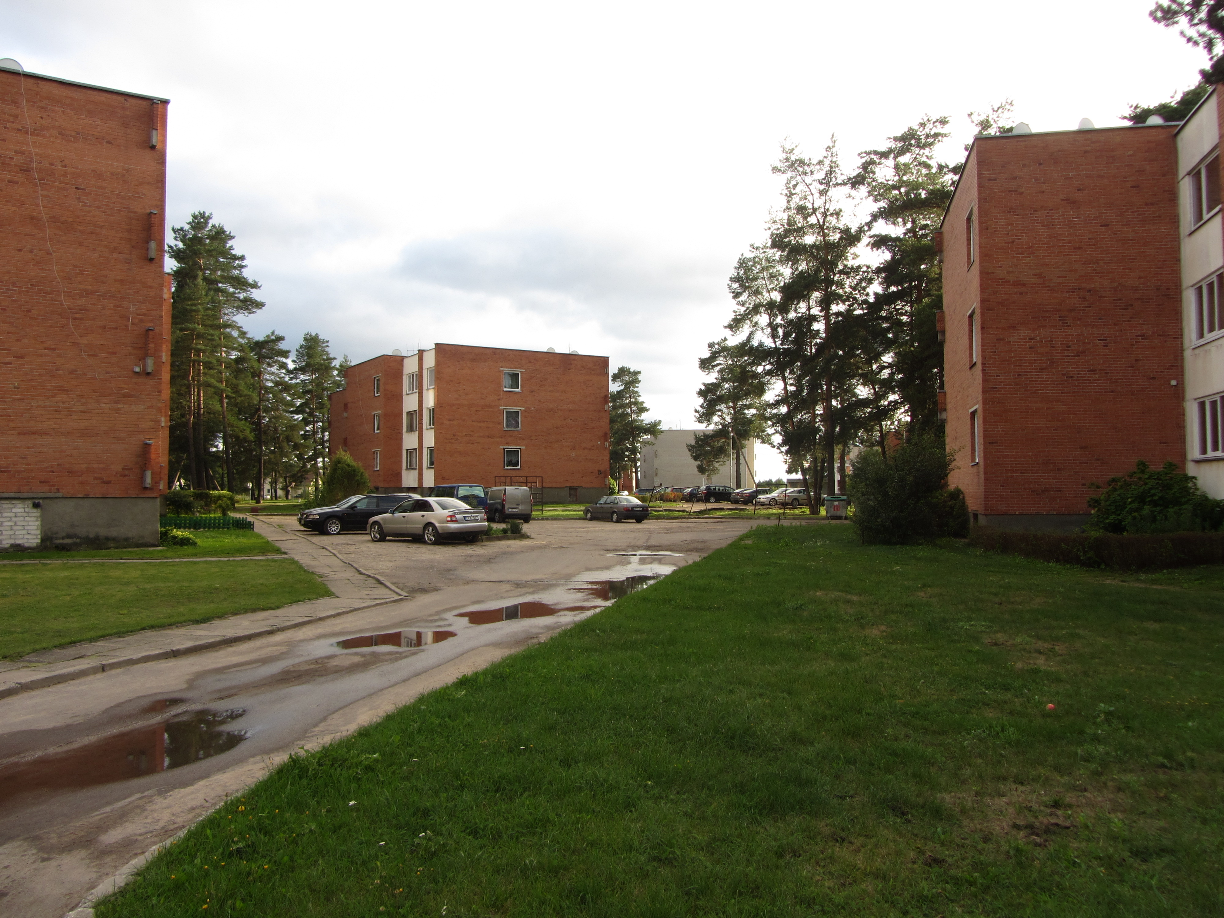 Baltoji Vokė, Lithuania